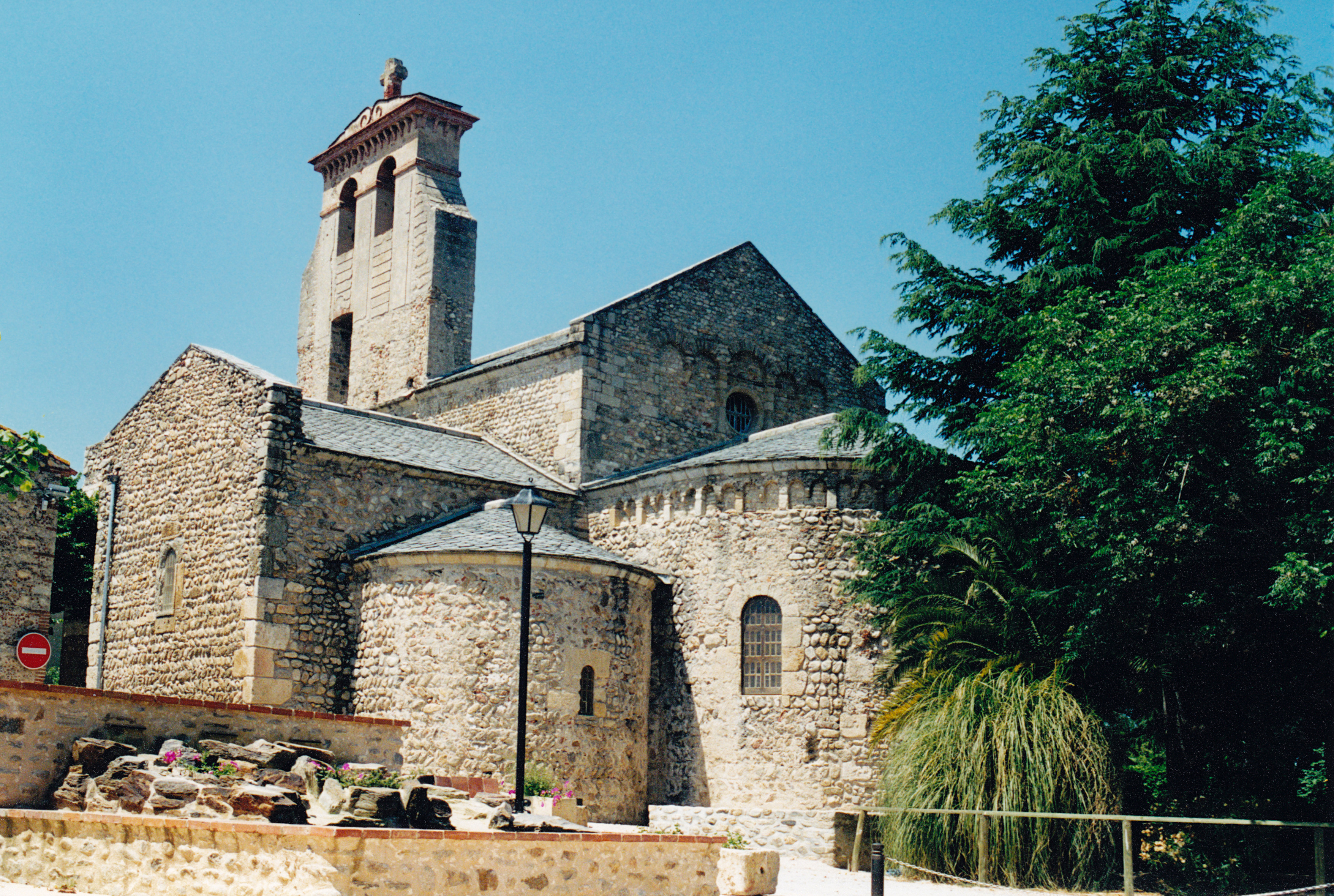 Monestir de Sant Andreu de Sureda (Rosselló)